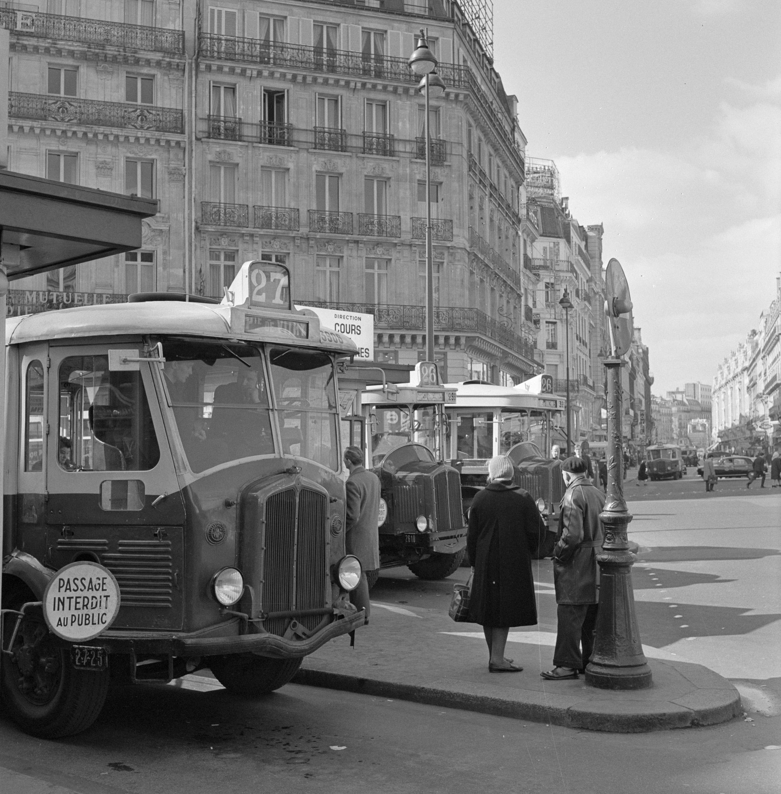 Collectie / Archief : Fotocollectie Van de Poll Reportage / Serie : Pariser Bilder [Het straatleven van Parijs] Beschrijving : Wachten bij de bushalte van Gare Saint-Lazare Datum : 1966 Locatie : Frankrijk, Parijs Trefwoorden : autobussen, busstations, openbaar vervoer, straatbeelden Fotograaf : Poll, Willem van de Auteursrechthebbende : Nationaal Archief Materiaalsoort : Negatief (6x6) Nummer archiefinventaris : bekijk toegang 2.24.14.02 Bestanddeelnummer : 254-0645